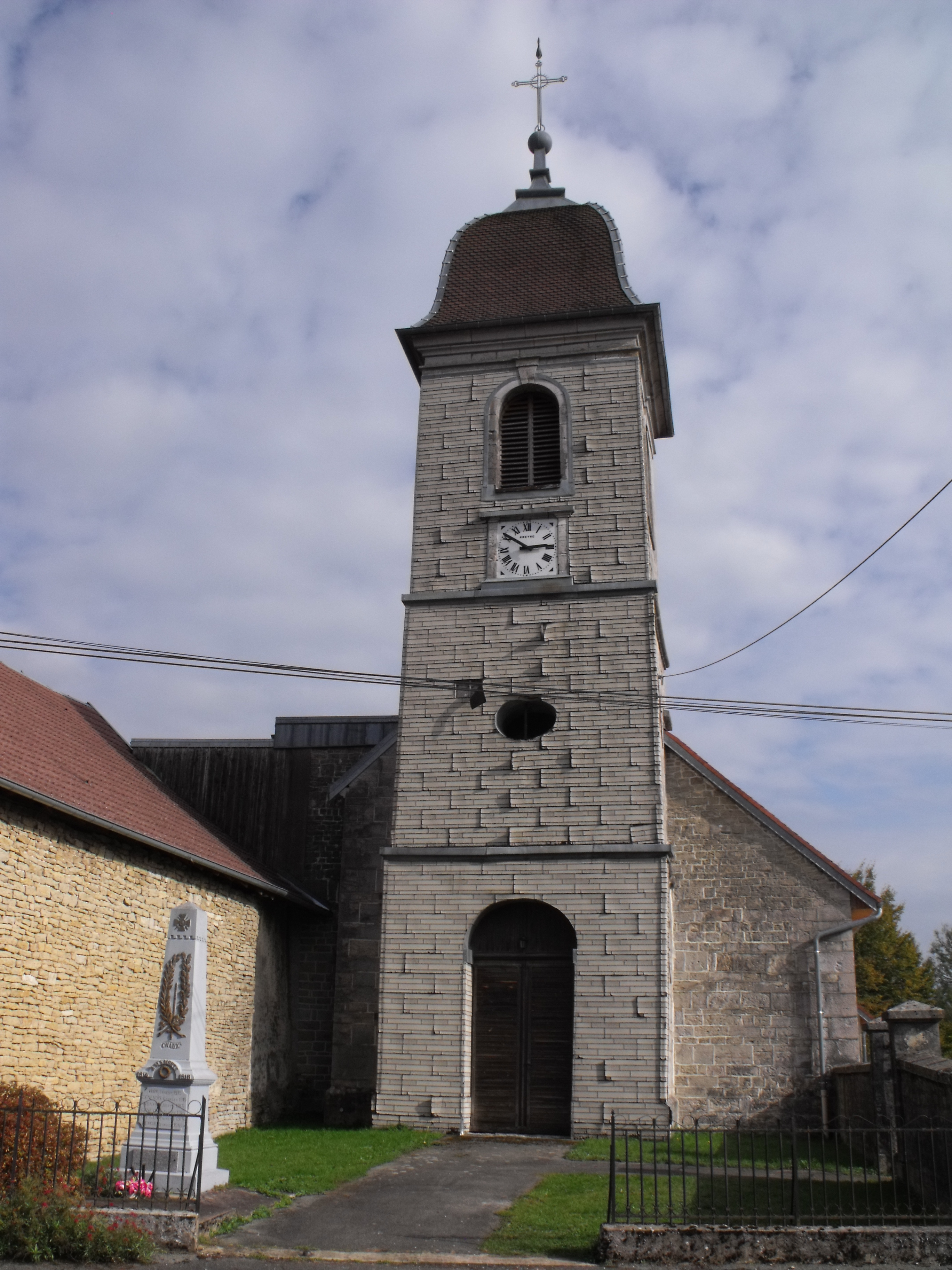 Eglise de Chaux-lès-Clerval, Doubs, France